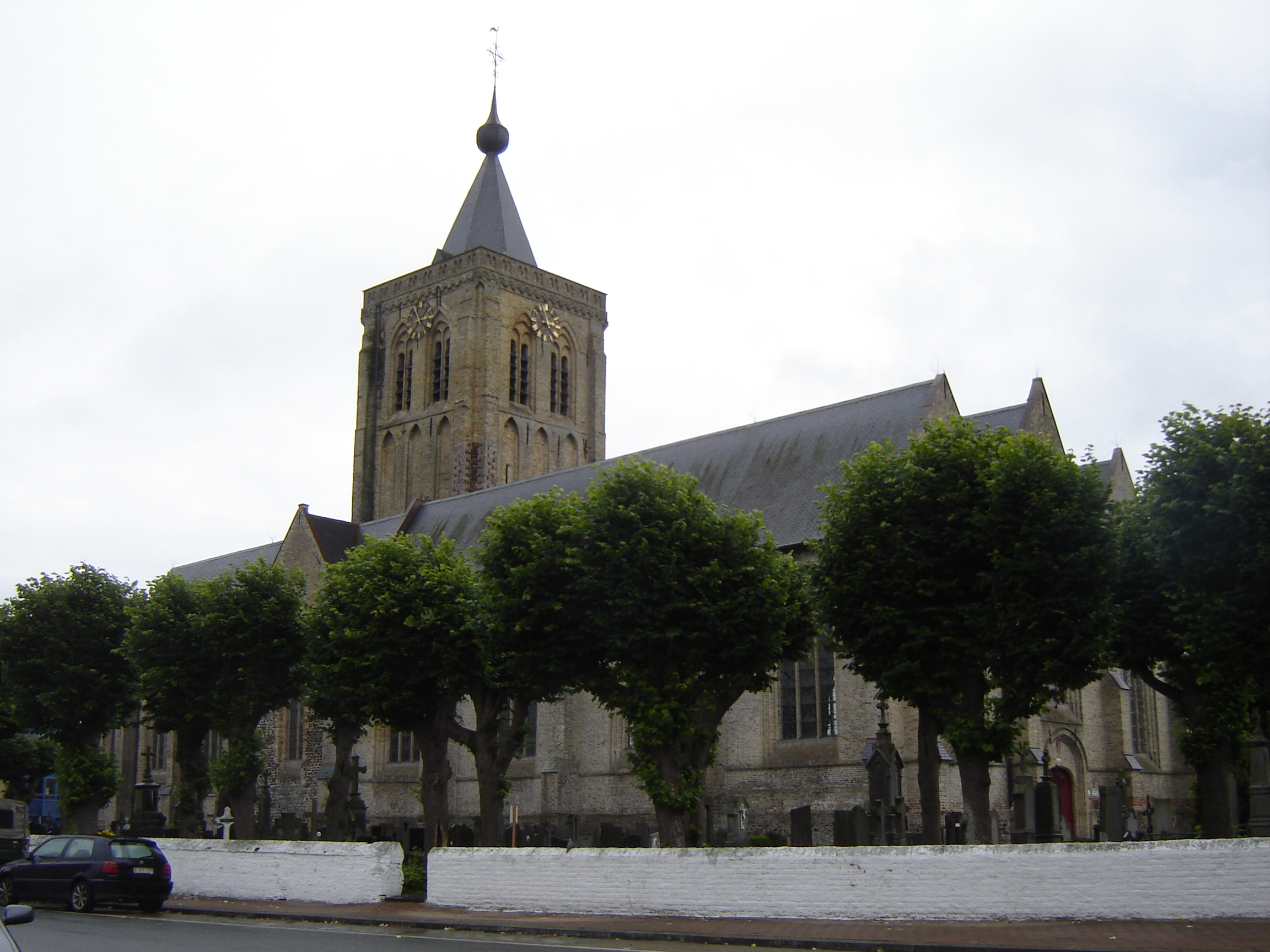 Sint Audomaruskerk in Alveringem. Church of Saint Audomare in Alveringem, West-Flanders, Belgium